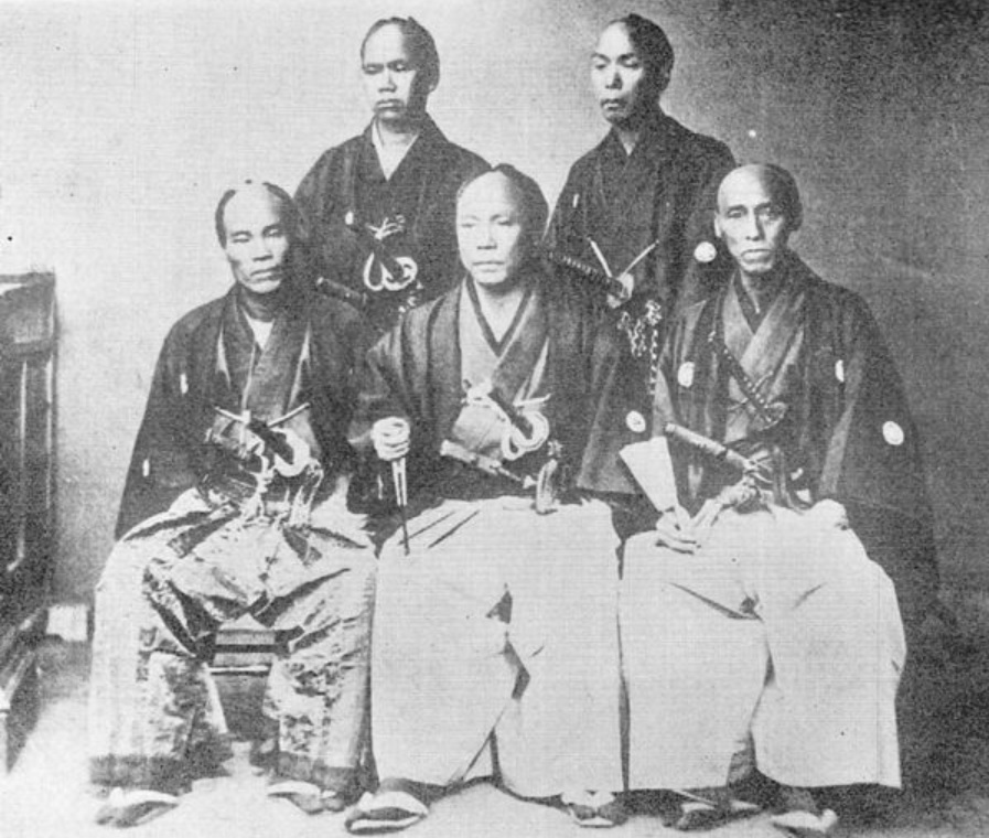 パリ万博での佐賀藩使節の写真。後列左が藤山種廣。